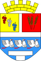 Wappen von Vinkovci